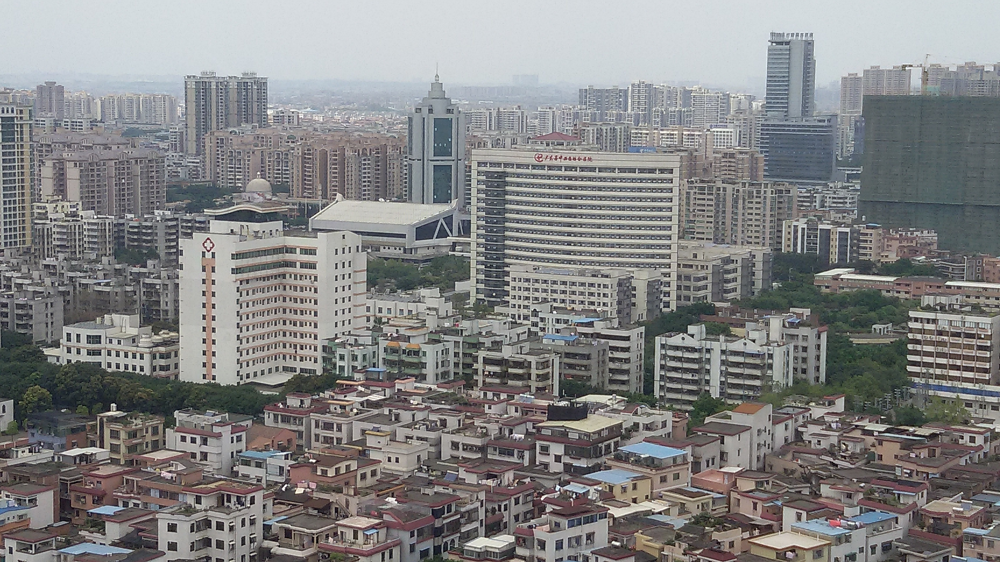 粵語: 廣東省中西醫結合醫院（南海區中醫院）